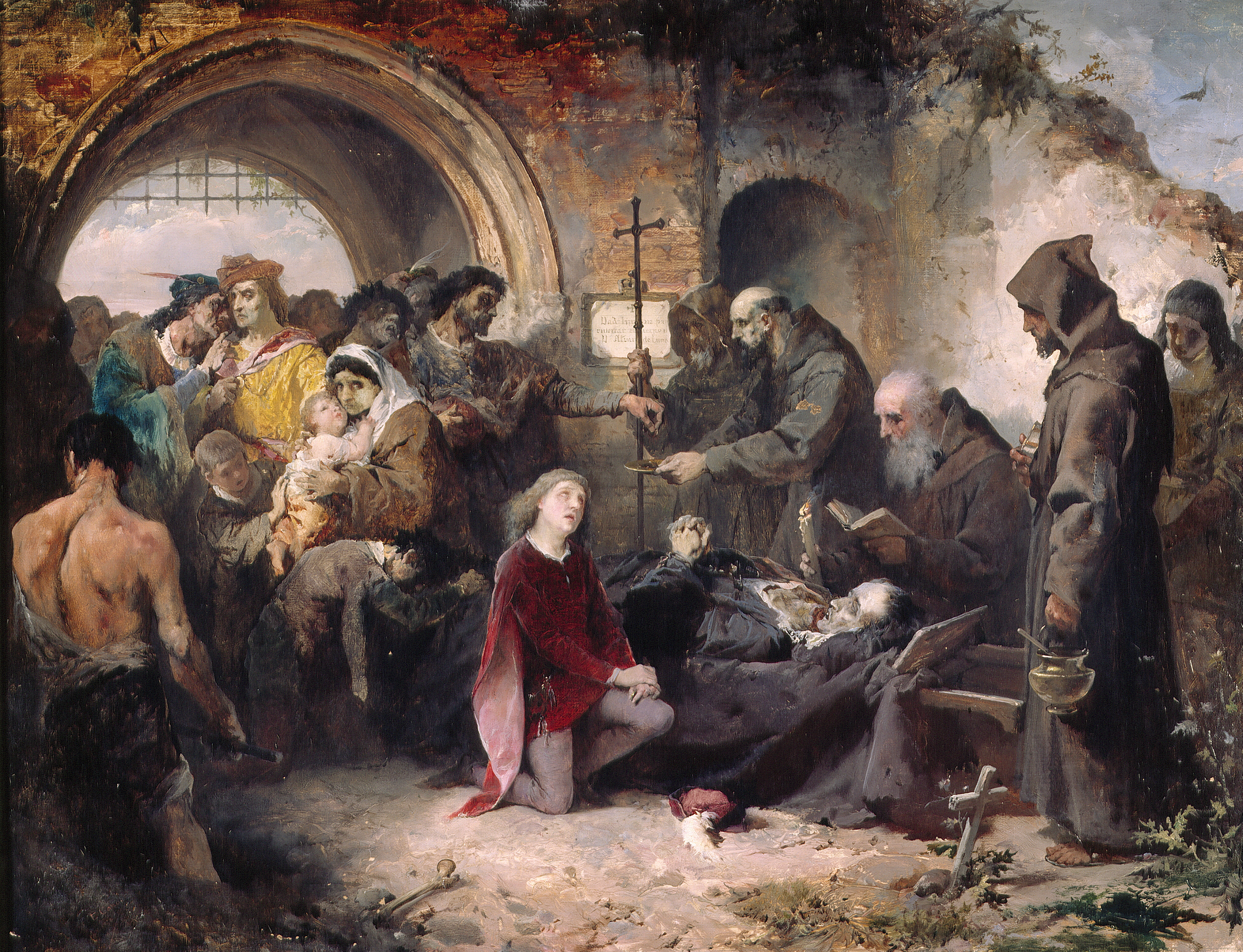 El lienzo es el boceto del cuadro pintado por Eduardo Cano en el que se representa el entierro del condestable don Álvaro de Luna, maestre de la Orden de Santiago y privado del rey Juan II de Castilla. Álvaro de Luna fue decapitado en la Plaza mayor de Valladolid en junio de 1453 y sus restos mortales reposan en la actualidad en la catedral de Toledo.